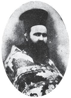 Стамат Георгиев.